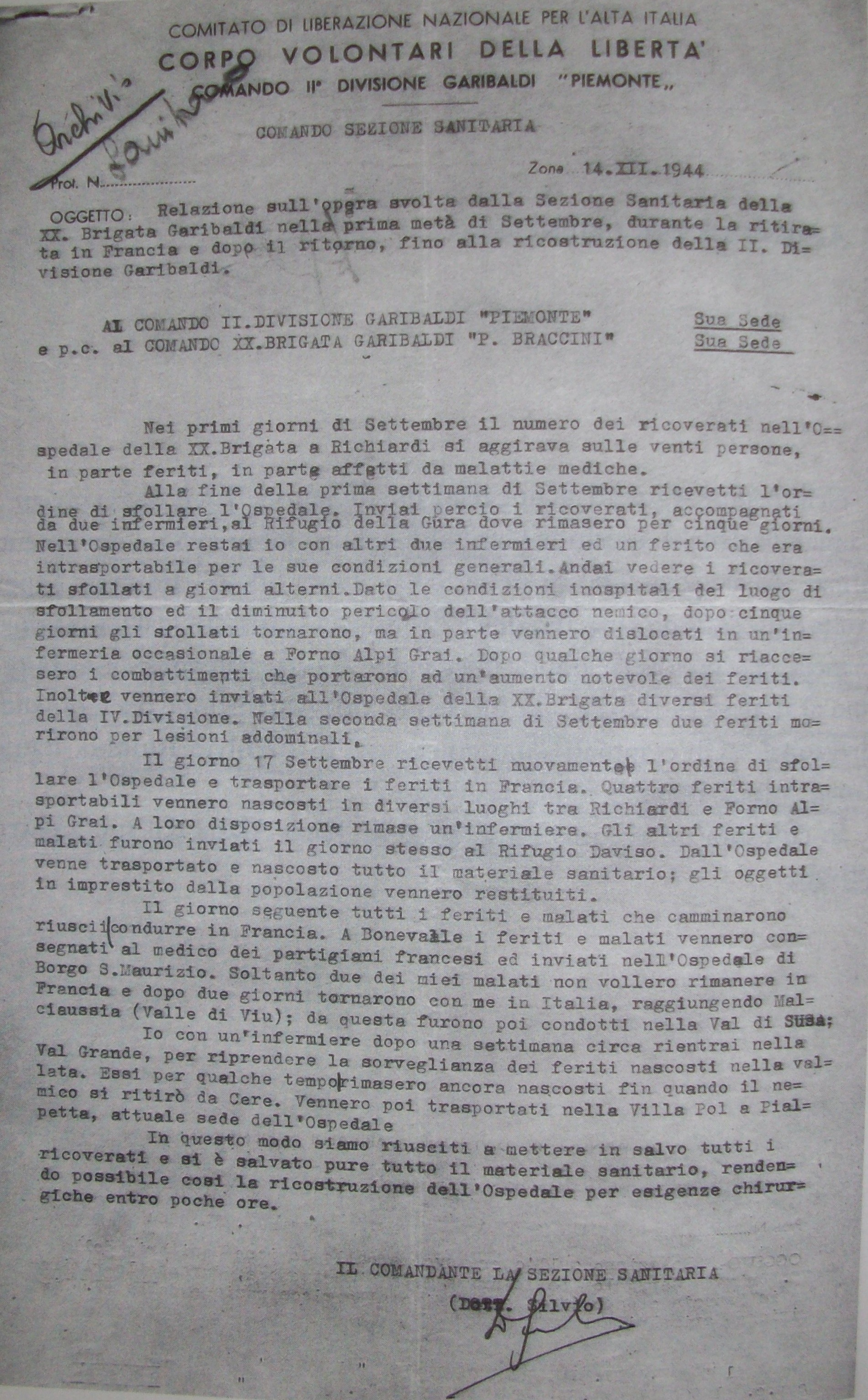 Relazione di Simone Teich Alasia inviate nel dicembre del 1944 al Comando della II Divisione Garibaldi. Il documento, firmato in calce con il nome di battaglia "Dott. Silvio", attesta l'opera svolta nella sezione sanitaria della 20esima brigata Garibaldi.